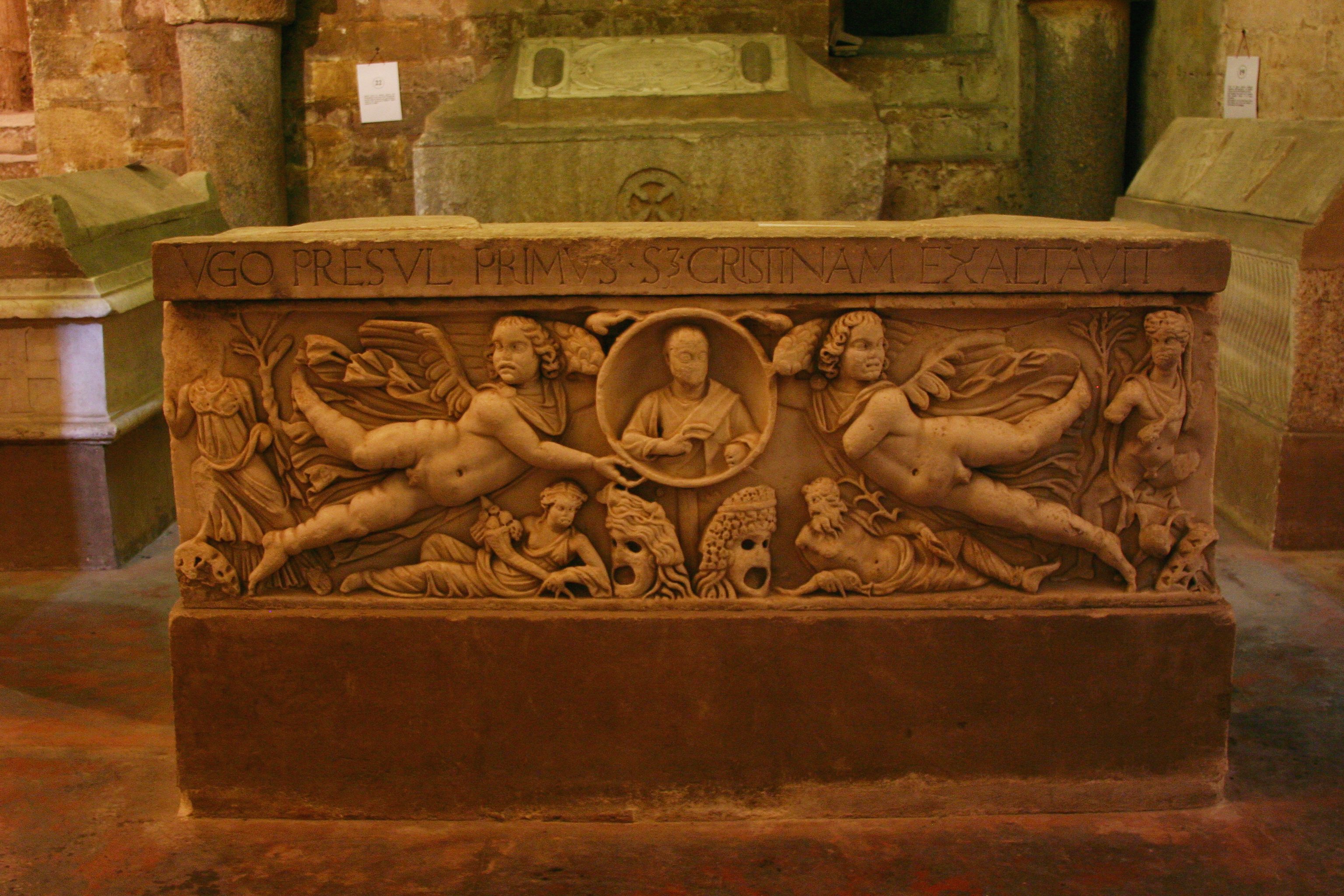 Crypt - Cathedral of Palermo